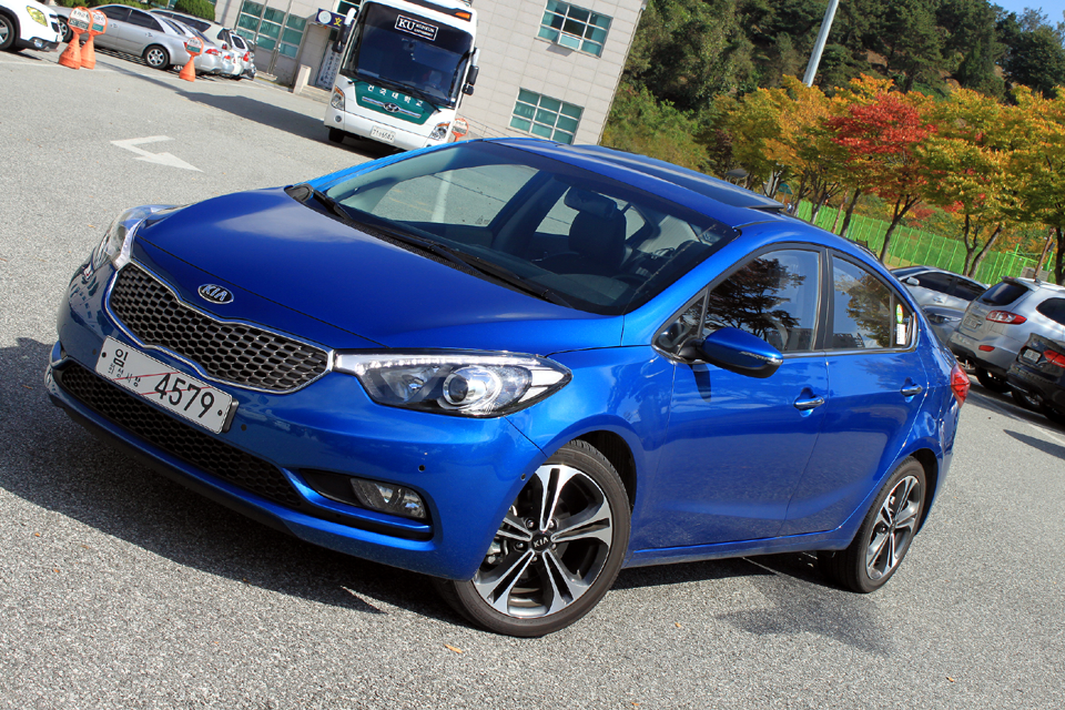 기아자동차 K3 전측면